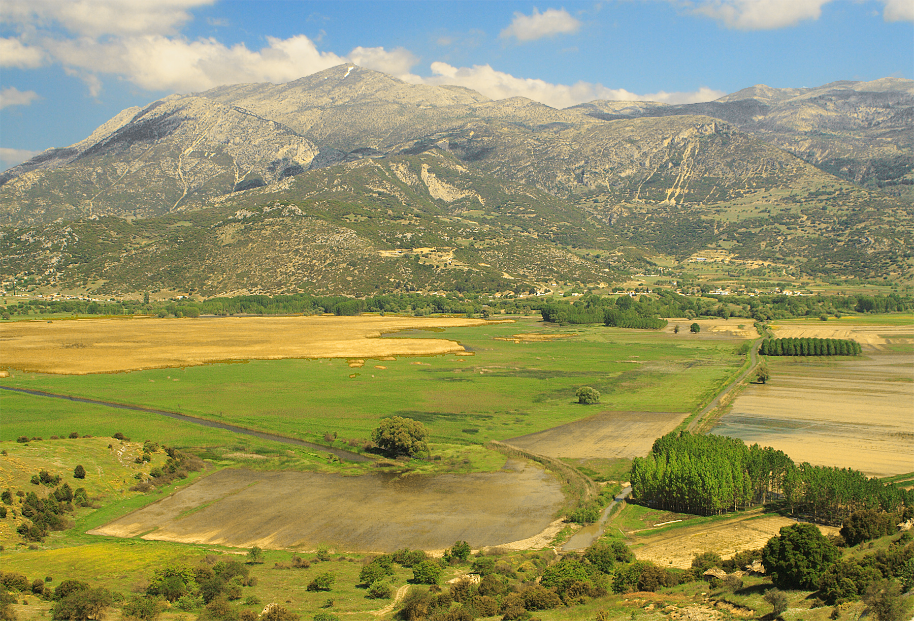 Stymfalia, limni / lake / See; Peloponnese, May 2006 Blickrichtung nord: Dorf Stymfalia, Ziria-Gebirge. Vordergrund: Felder noch reilweise überflutet; Wassergraben unmittelbar vor Hadrian-Tunnel, Seegrenze. View north: Village Stymfalia, Mountain Ziria. Foreground: flooded fields, drainage trench enters Hadrin tunnel.